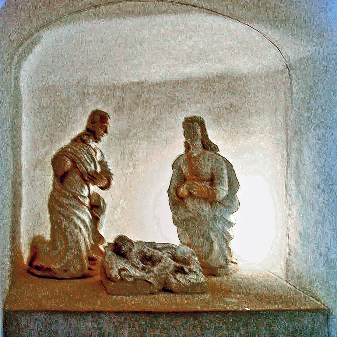 Groupe sculpté (crèche), église Saint-Martin-de-Vertou de Linières-Bouton, 17ème siècle.